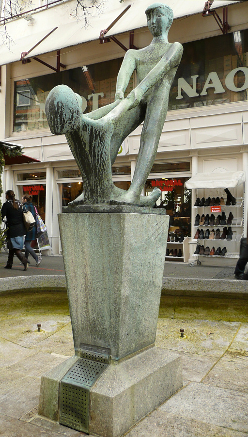 Kurt Lehmann, Spielende Kinder // Standort: Im Brunnen in der Grupenstraße, Altstadt von Hannover